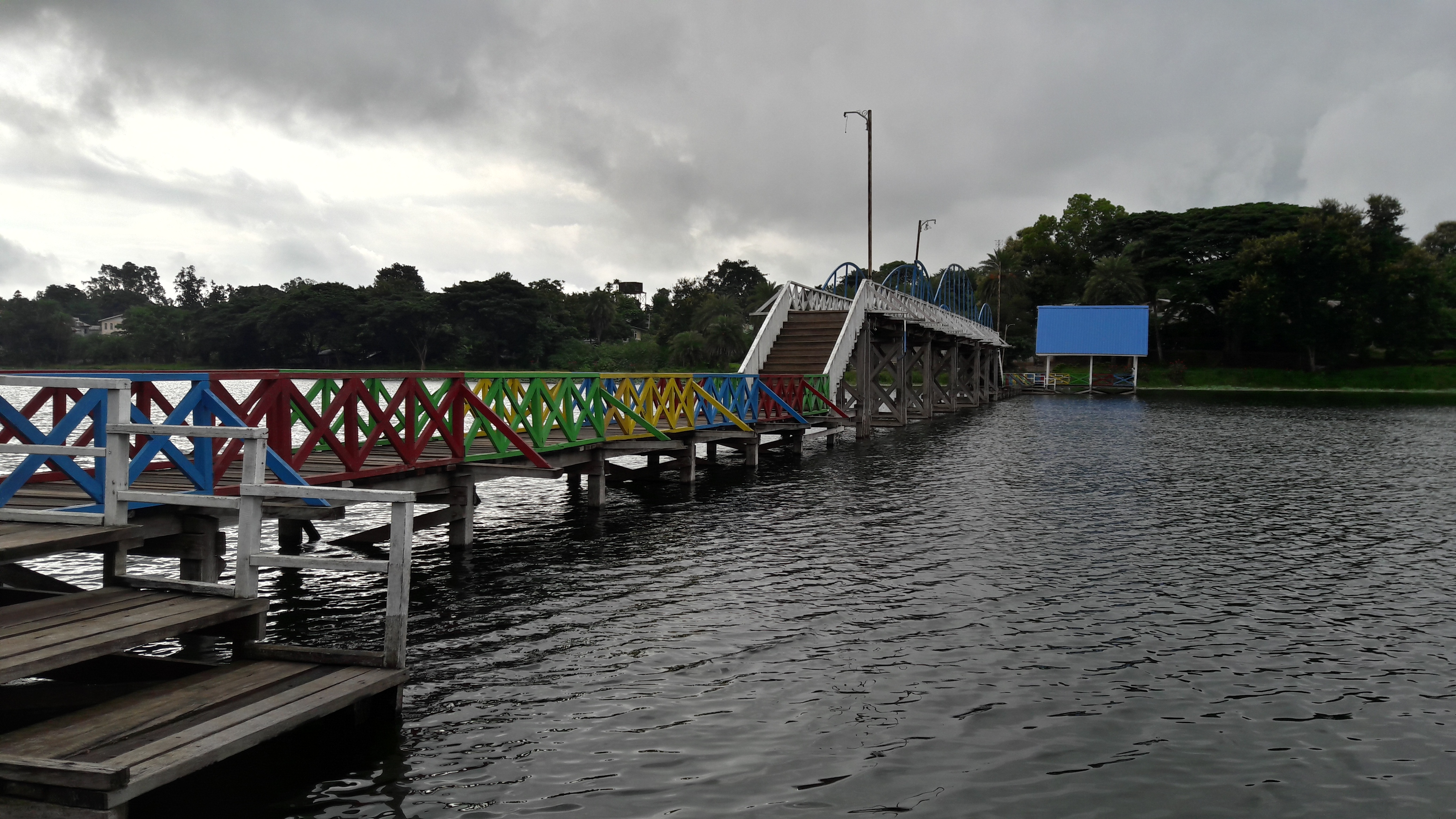 Naung Yah Lake